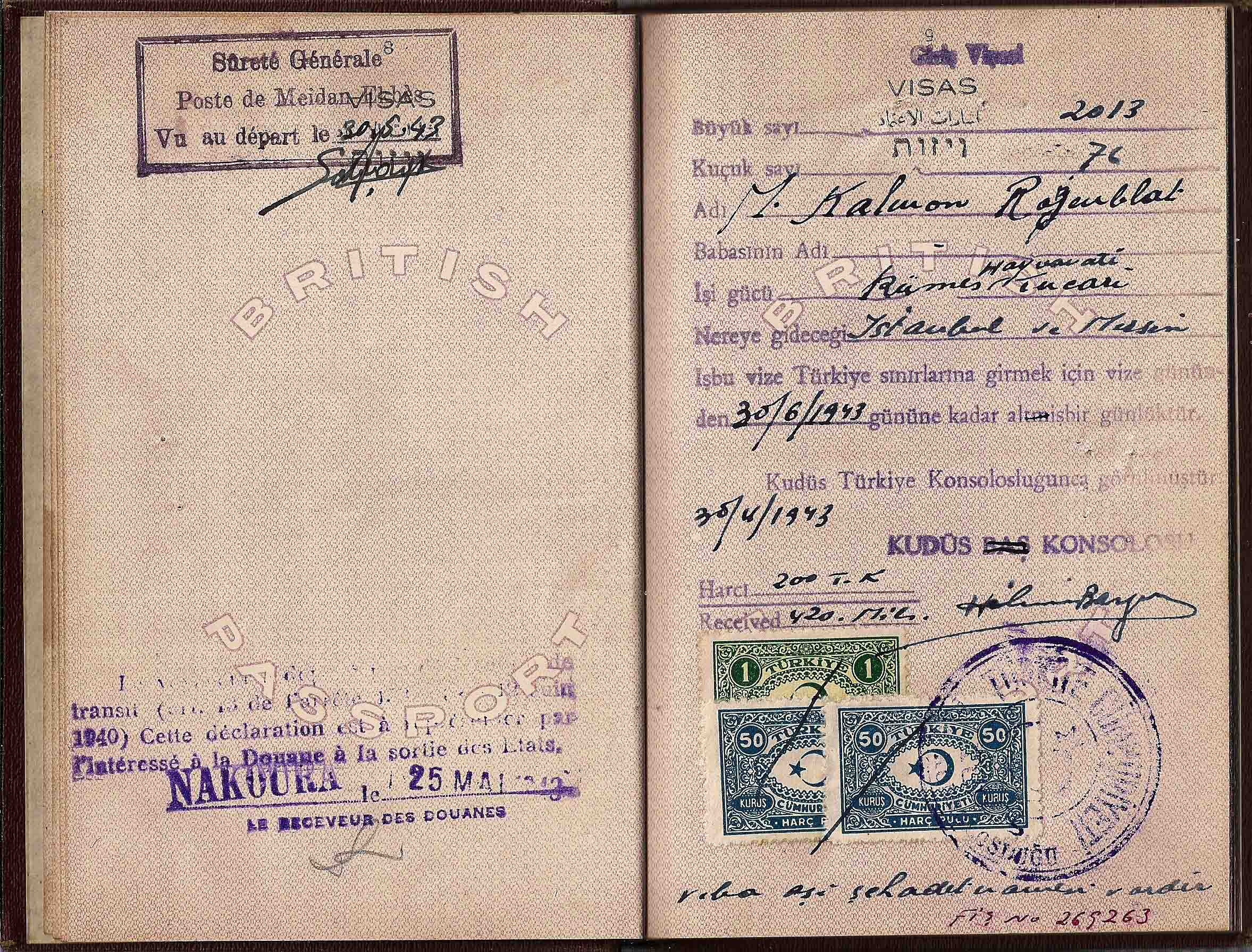 ויזה בדרכון מנדטורי משנת 1943 שניתנה לנציג ארץ ישראלי שנשלח לטורקיה.